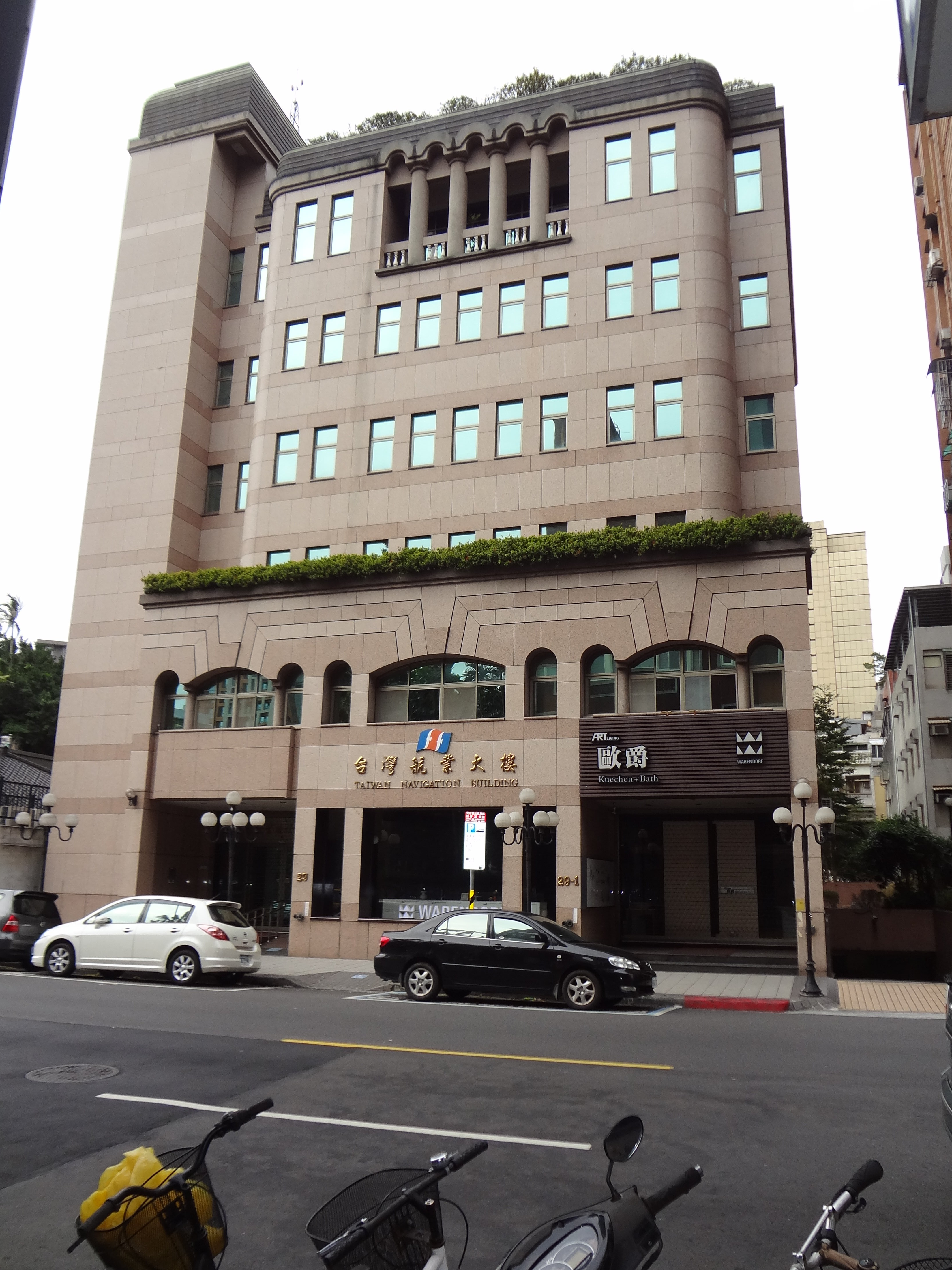 台灣航業大樓，位於臺北市中正區濟南路二段29、29之1號。